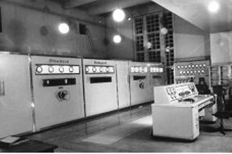 Fehér Ferenc Precíziós Mechanikai és Gépműhelye. A lakihegyi adó vezérlőterme